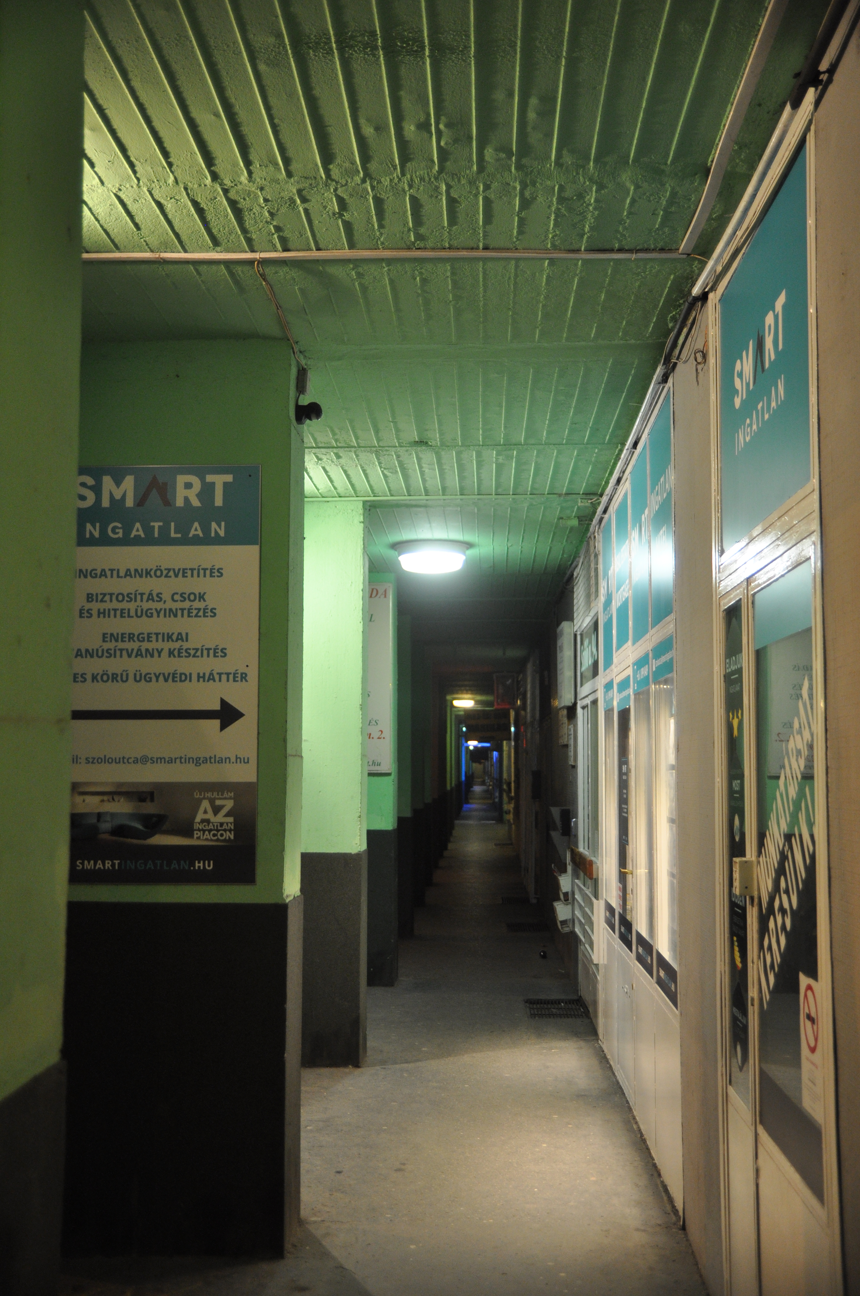 Budapest, Flórián tér, panelház árkád